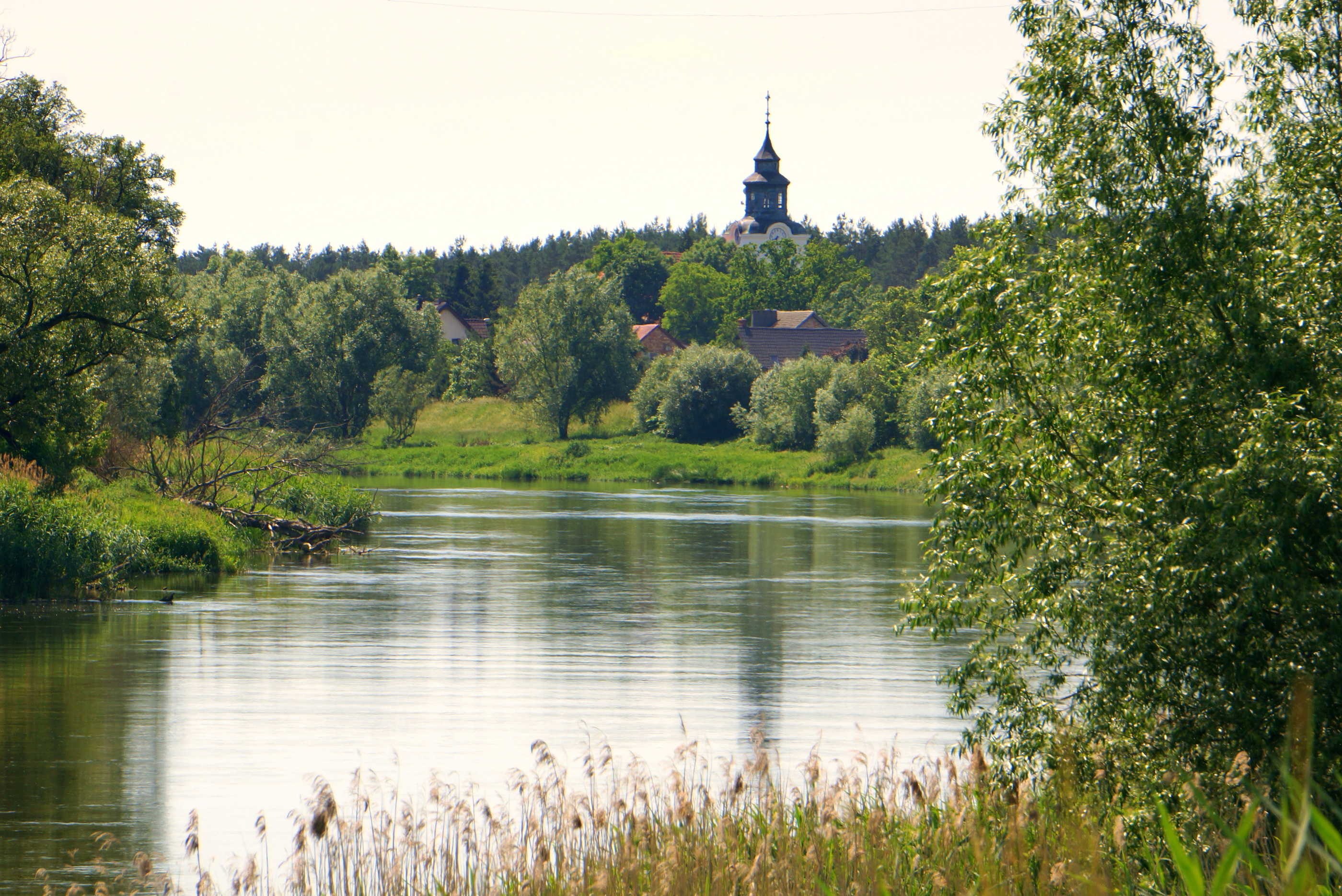 Warta w Borku, w powiecie gorzowskim. Widoczna wieża kościoła filialnego pw. Najświętszego Serca Pana Jezusa